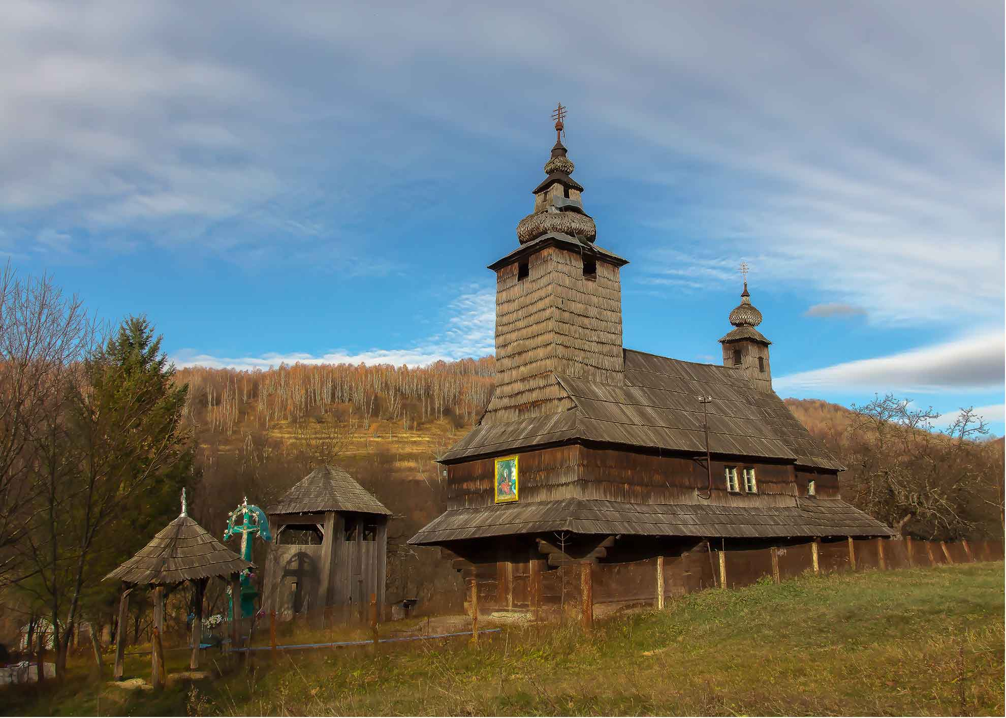 Церква Св.Ганни (дер.), Буківцеве